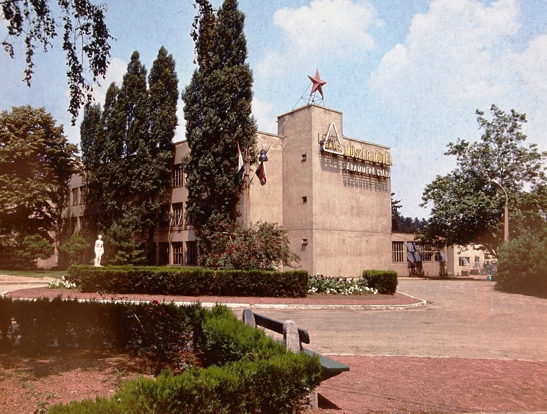 Ganz Árammérőgyár (Rimanóczy Gyula építész, 1949 /wikipedia/), GödöllőGanz Electrical measurement instrument factory